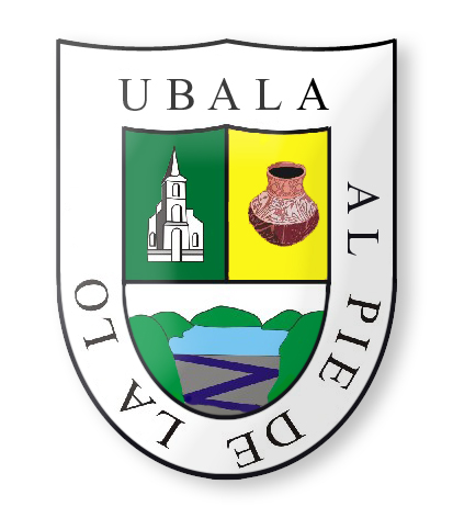 Representa la riqueza de nuestro municipio de Ubalá